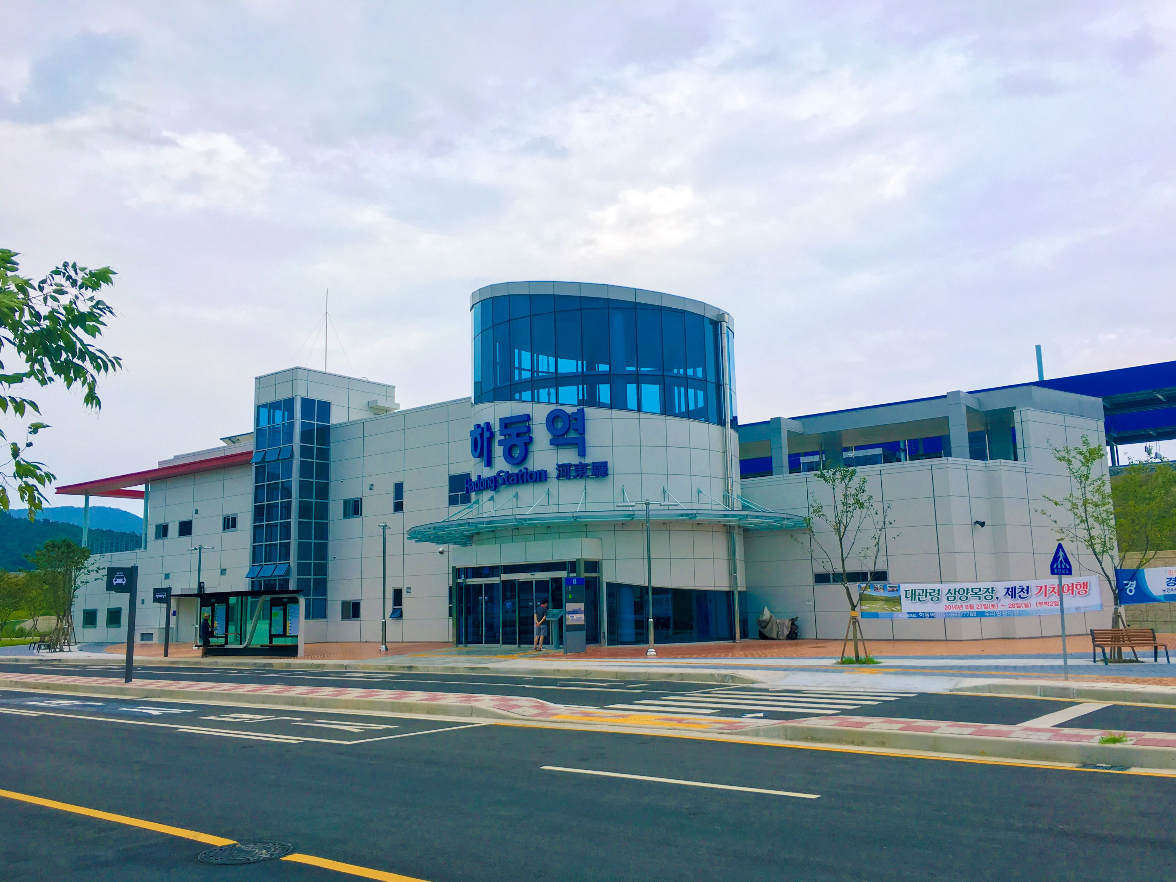 하동역 역사